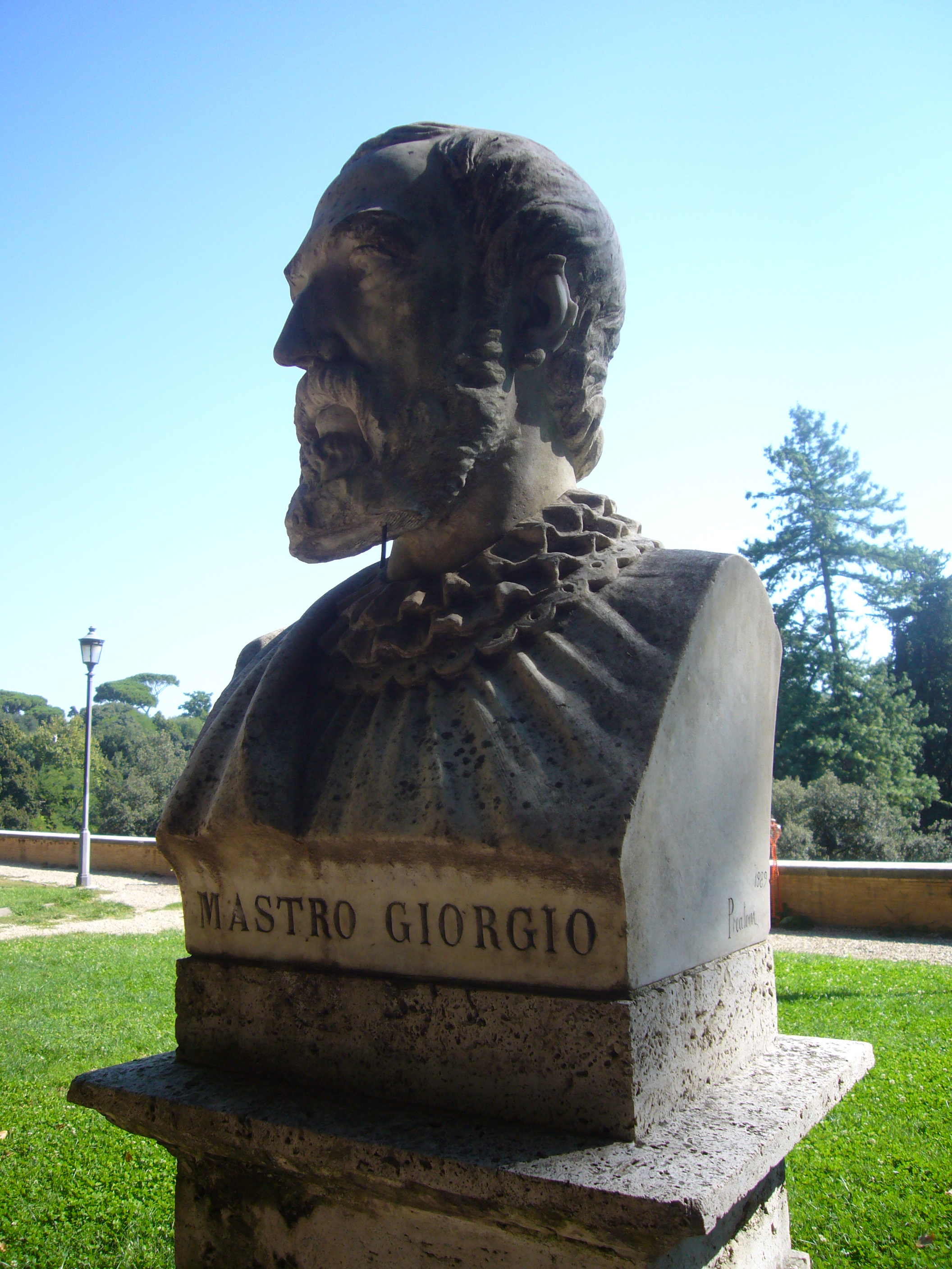 Roma, Pincio. Busto di Mastro Giorgio (Giorgio Andreoli)